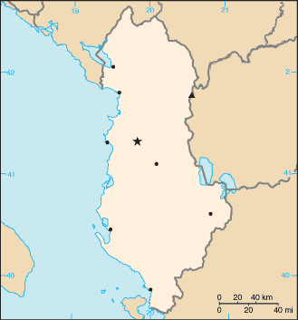 Harta Shqipëria